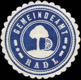 Sealing stamp Title: Gemeindeamt Radl Description: dunkelblau, weiß, geprägt Place: Radl size: 4 cm